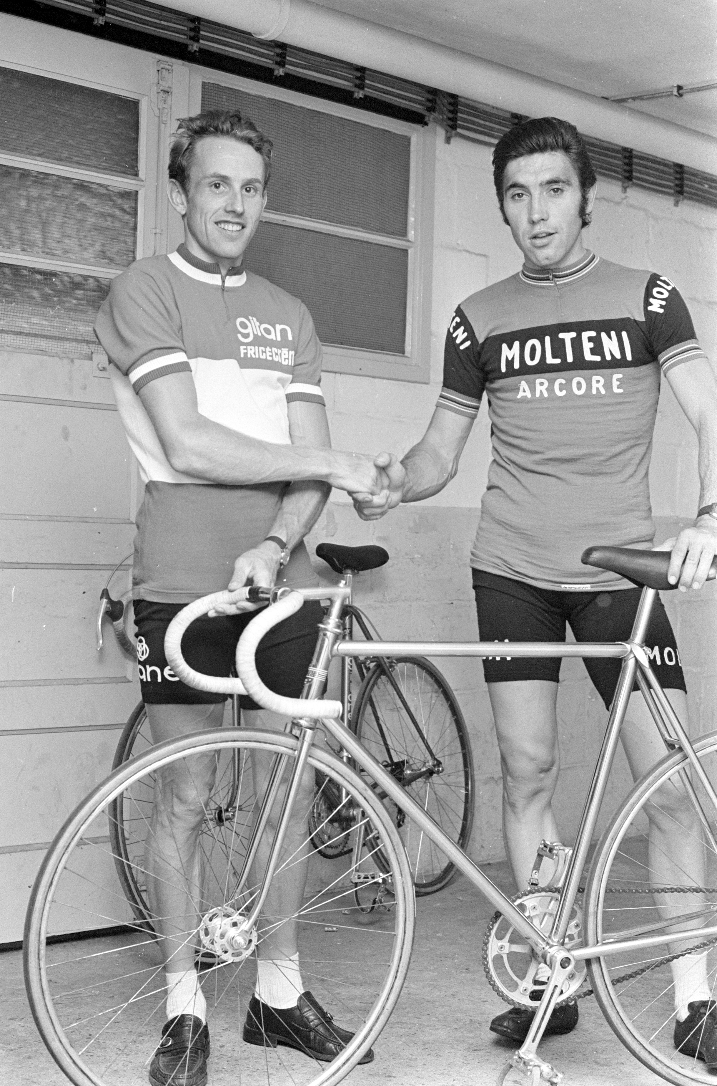 Nationaal Archief Beschrijving: Joop Zoetemelk en Eddy Merckx schudden elkaar de hand Datum: 2 augustus 1973 Bestanddeelnummer 926-5866 Vervaardiger: Anefo / Verhoeff, Bert URL: Voor meer informatie over het Nationaal Archief: Voor meer foto's uit deze en andere collecties, bezoek onze Beeldbank:, U kunt ons helpen onze kennis van de fotocollecties te verrijken door tags en commentaren toe te voegen. Herkent u mensen of locaties of heeft u een bijzonder verhaal te vertellen bij één van de foto's, laat dan een reactie achter (als u ingelogd bent bij Flickr) of stuur een mailtje naar